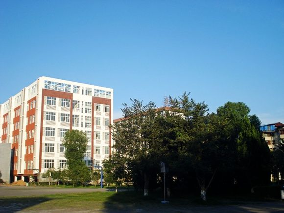 中文（中国大陆）: 建阳二中创新楼